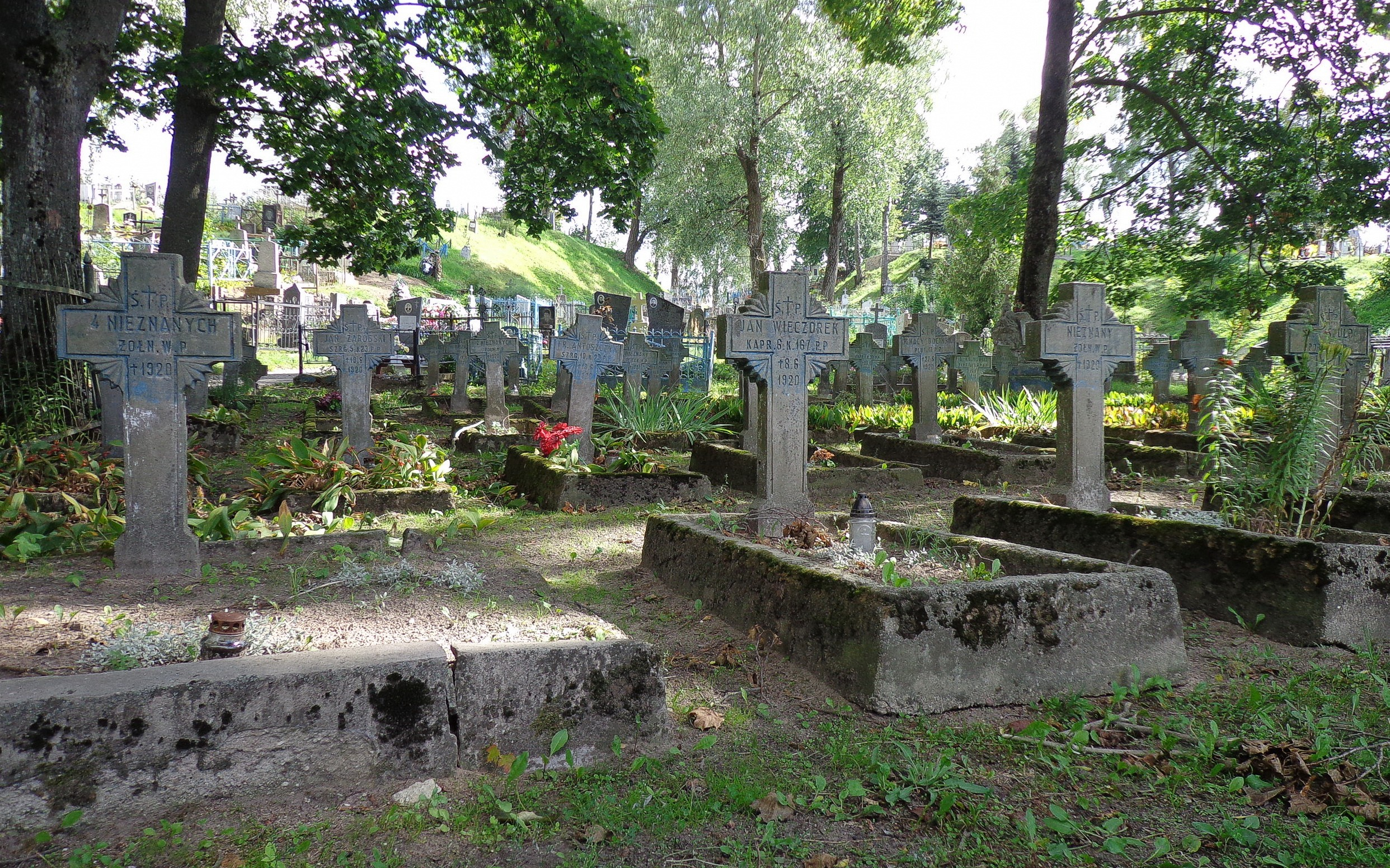 ГЛЫБОКАЕ. Польскiя вайсковыя могiлкi.